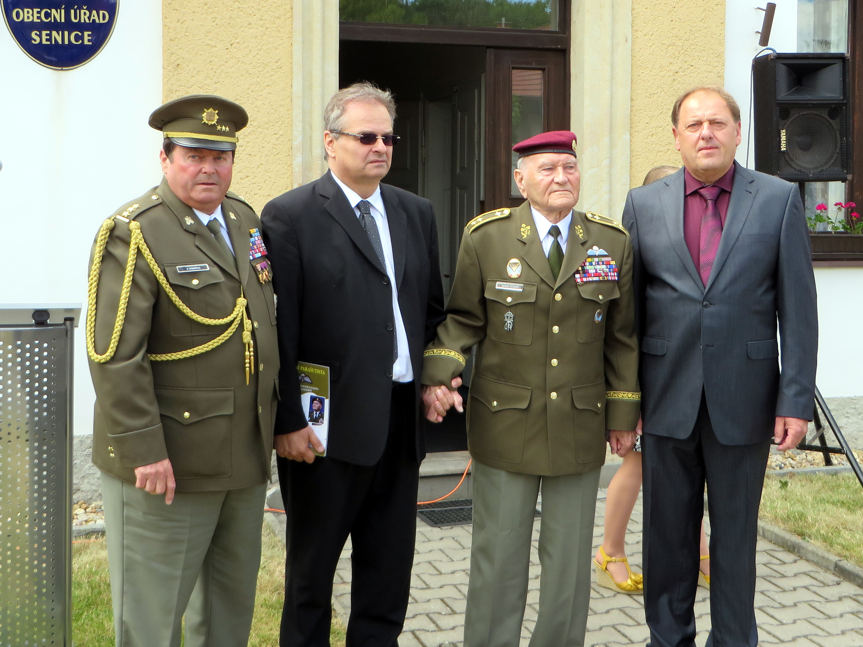 Senice. Pietní akt k uctení památky skupiny Silver A. Jaroslav Vodička (ČSBS), ?, Jaroslav Klemeš, Václav Novák (starosta Senic)